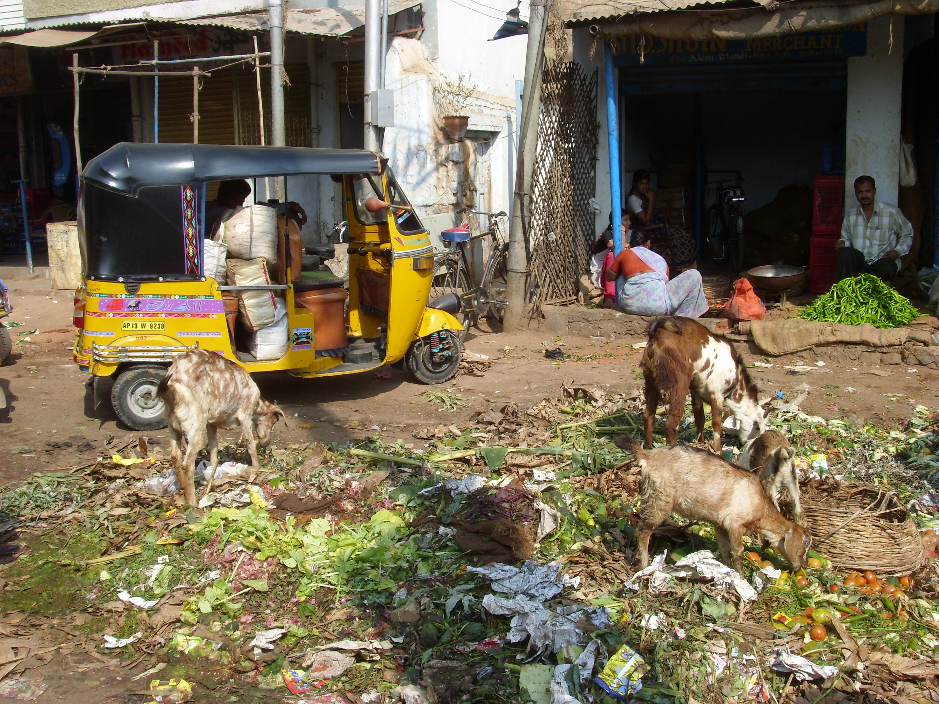 Vegetable waste and garbage being dumped in a market in Hyderabad.